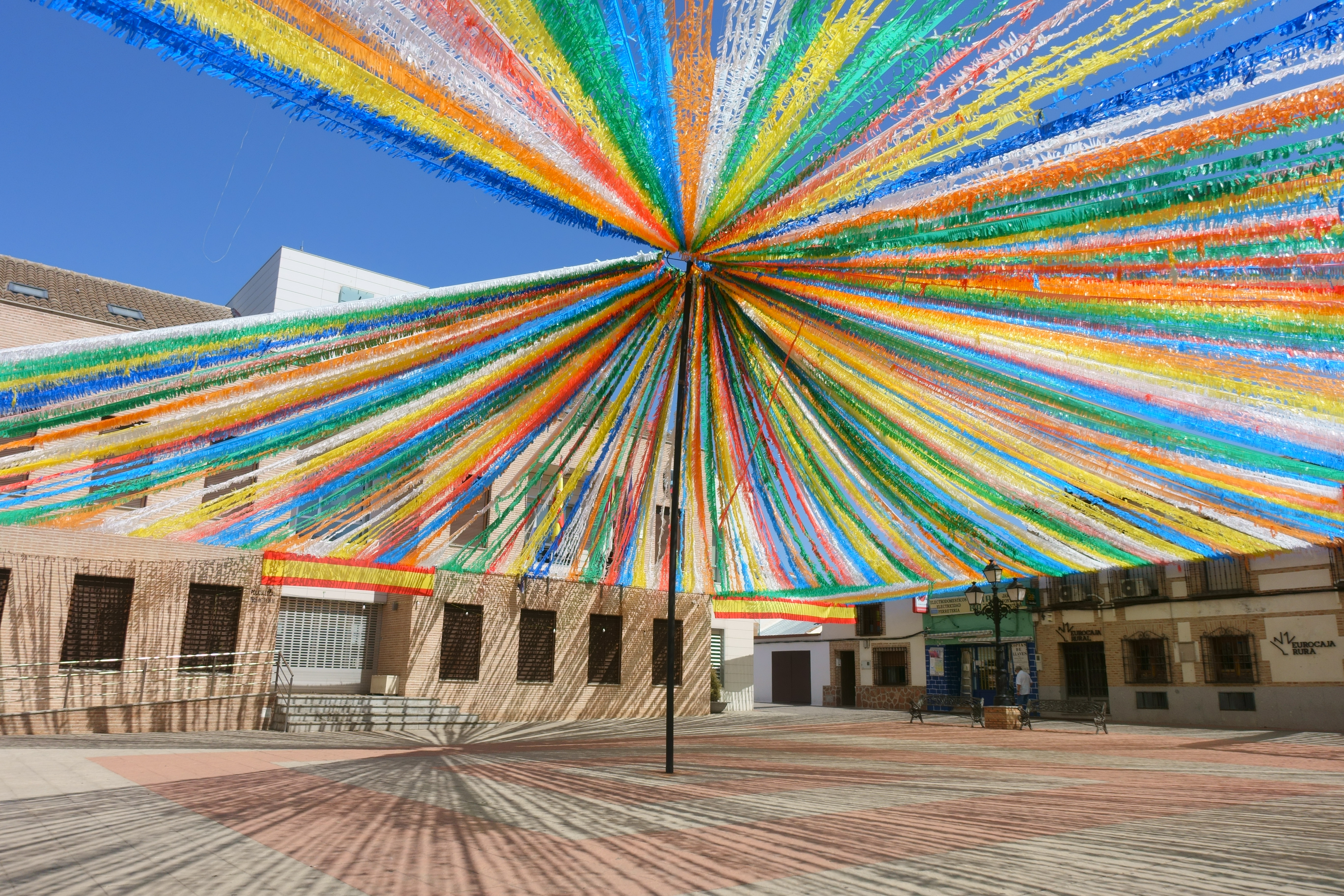 Plaza del Ayuntamiento, con la casa consistorial, en El Casar de Escalona (Toledo, España).